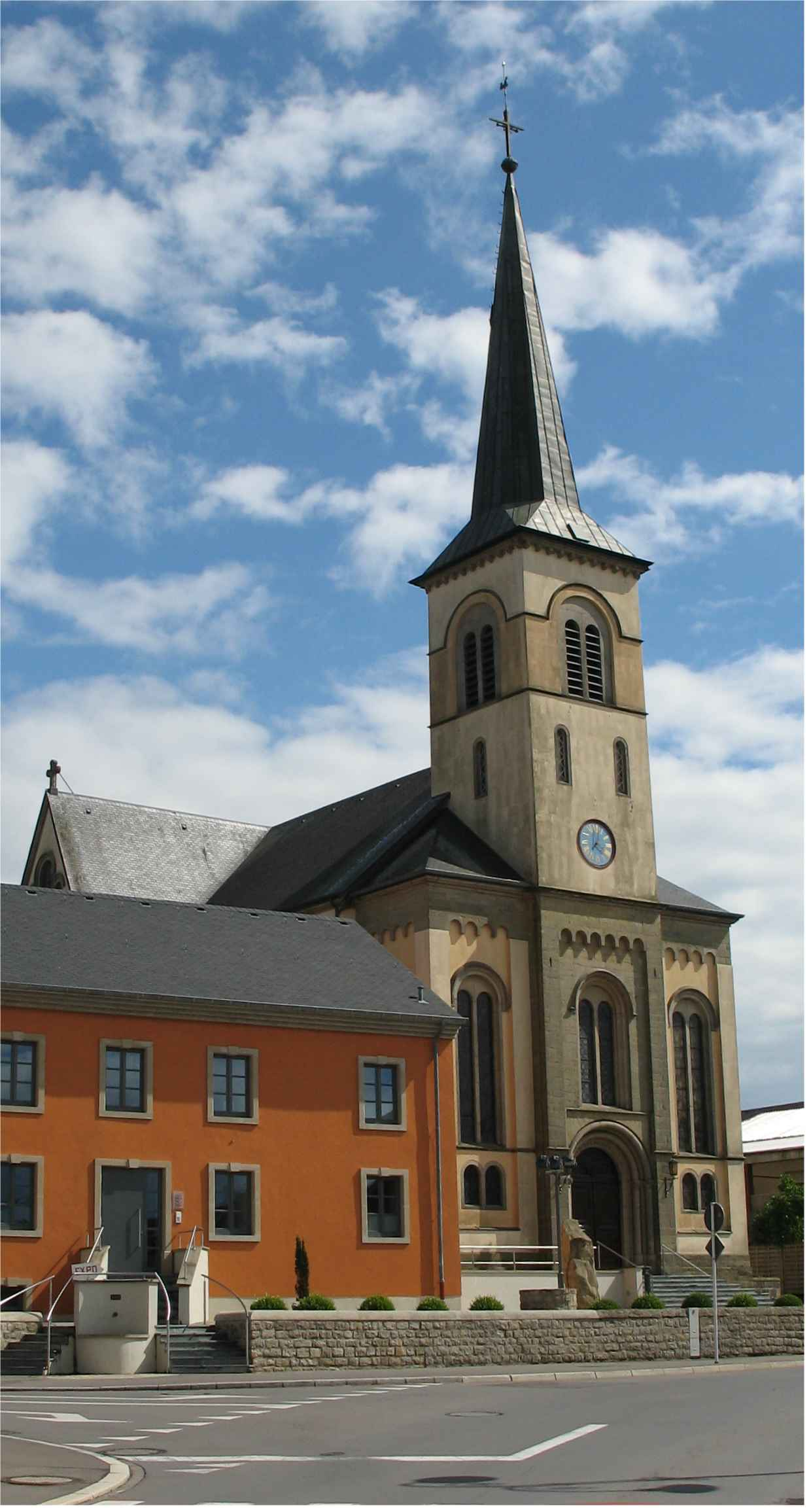 Kierch a Galerie mat Internetstuff zu Kielen. Kategorie:Gemeng Kielen Kielen